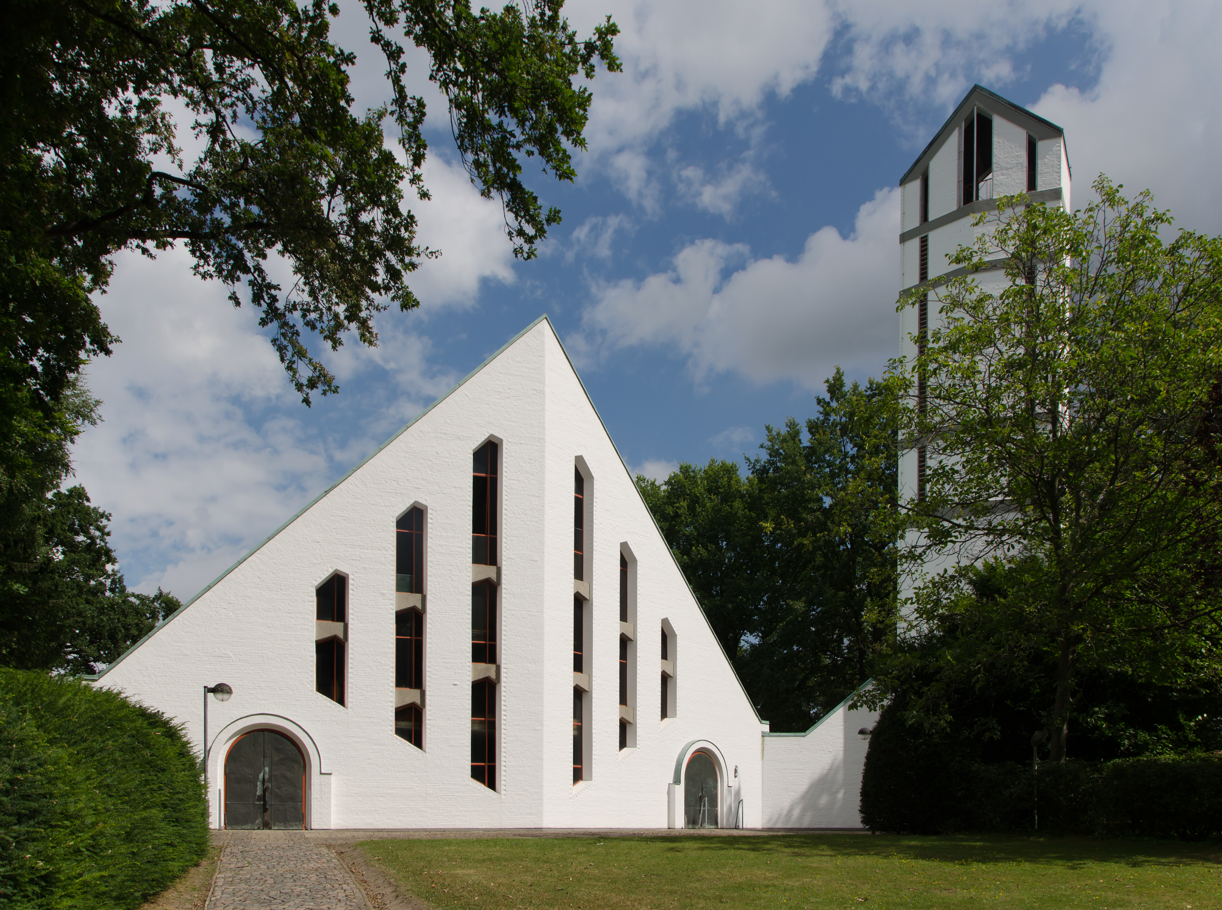 Rahlstedt St.Martin